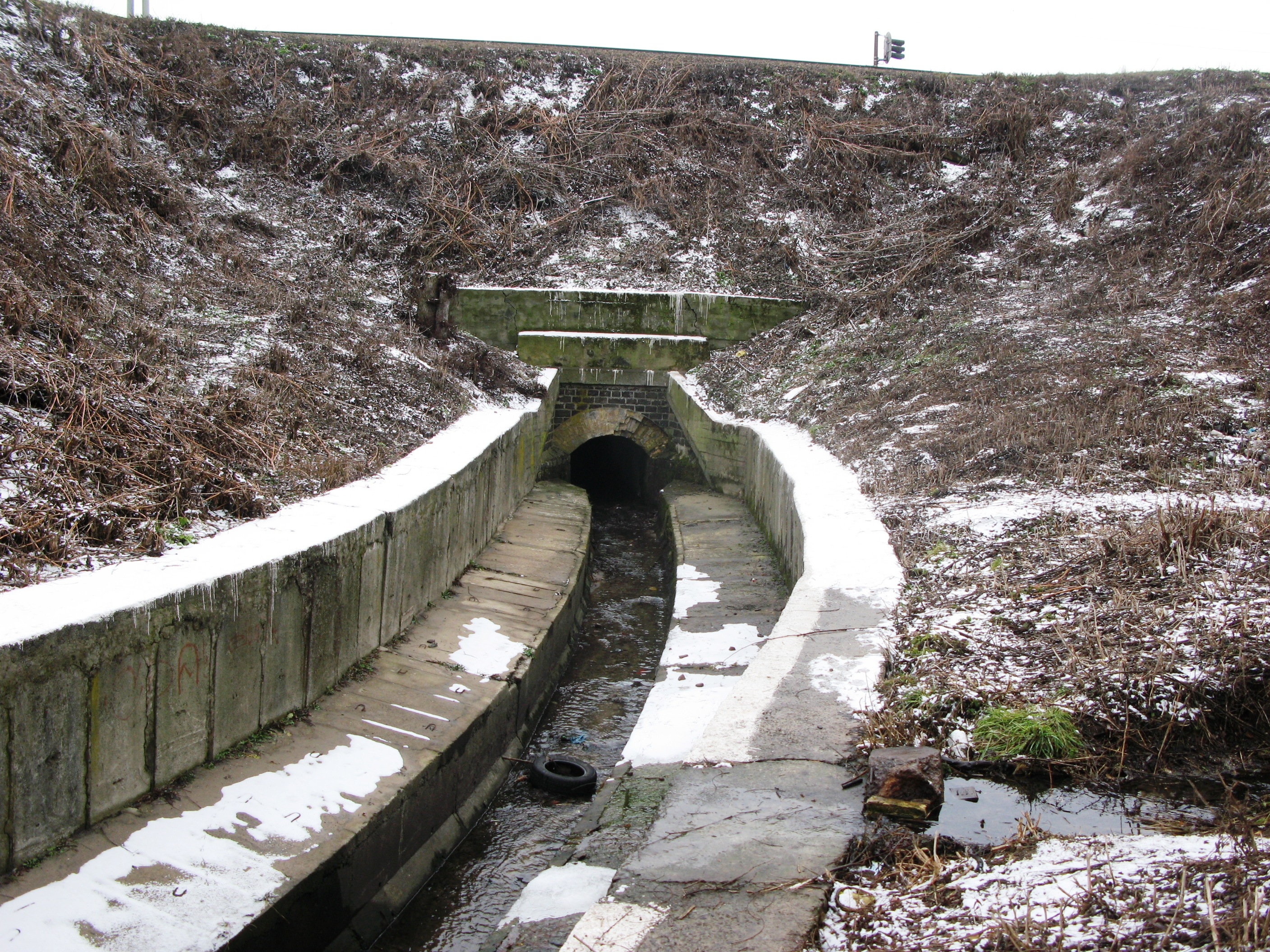 Вихід Вершинки із водопропускної труби під залізницею